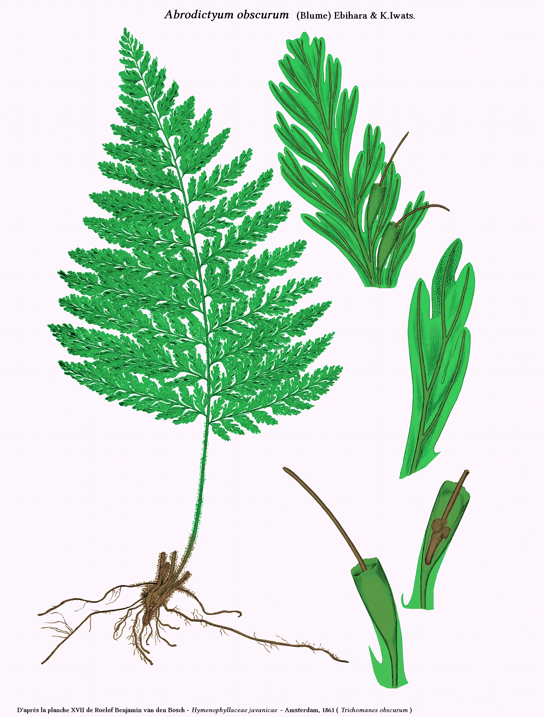 Abrodictyum obscurum - D'après la planche XVII de Roelof Benjamin van den Bosch - Hymenophyllaceae javanicae - Amsterdam, 1861 - Planche reprise sous Gimp par D. Prévôt